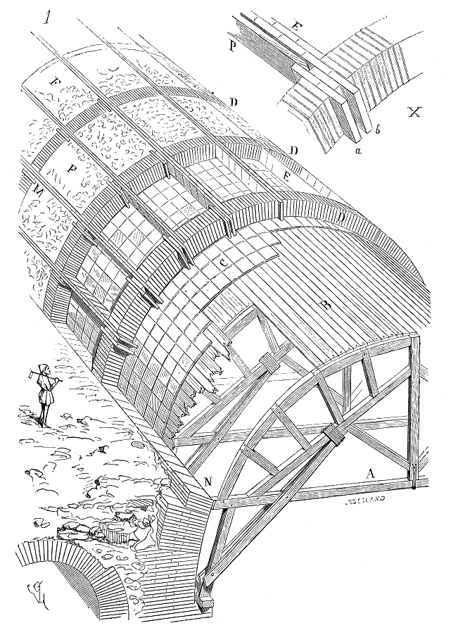 ... Notre figure 1 expliquera cette méthode de construire les voûtes. Soit un berceau à voûter. Des cintres légers de charpente A, relevés, ont été posés à intervalles égaux, leurs courbes commençant au niveau de la portion de voûte qui a déjà pu être élevée sans le secours d'un cintrage, mais à l'aide d'une simple tige de bois ou de cerces. Ces cintres ont été réunis par des planches ou couchis B, qu'il n'a pas été nécessaire de poser jointifs, planches assez épaisses pour ne pas plier sous la charge d'un homme. Sur ces planches, les maçons ont fait le carrelage C avec de grandes briques plates, comme on construit encore de nos jours des voûtes en tuiles ou carreaux de terre cuite, ciment ou plâtre. Dès lors les ouvriers opéraient sur une croûte solide, homogène et pouvant résister à une charge. Les nerfs D ont été posés à l'aplomb de chaque cintre et formés de grandes briques carrées. Ces nerfs ont été disposés ainsi que l'indique le détail X, avec des doubles briques ab, de distance en distance, de manière à pouvoir couler dans la rainure laissée entre elles des planches P normales à la courbe. Le long de ces planches considérées comme dossiers, ont été posées les entretoises E en grandes briques se chevauchan ...